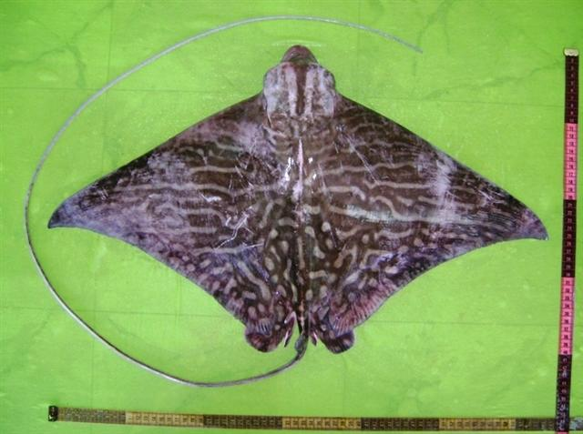 Полосатый летучий скат